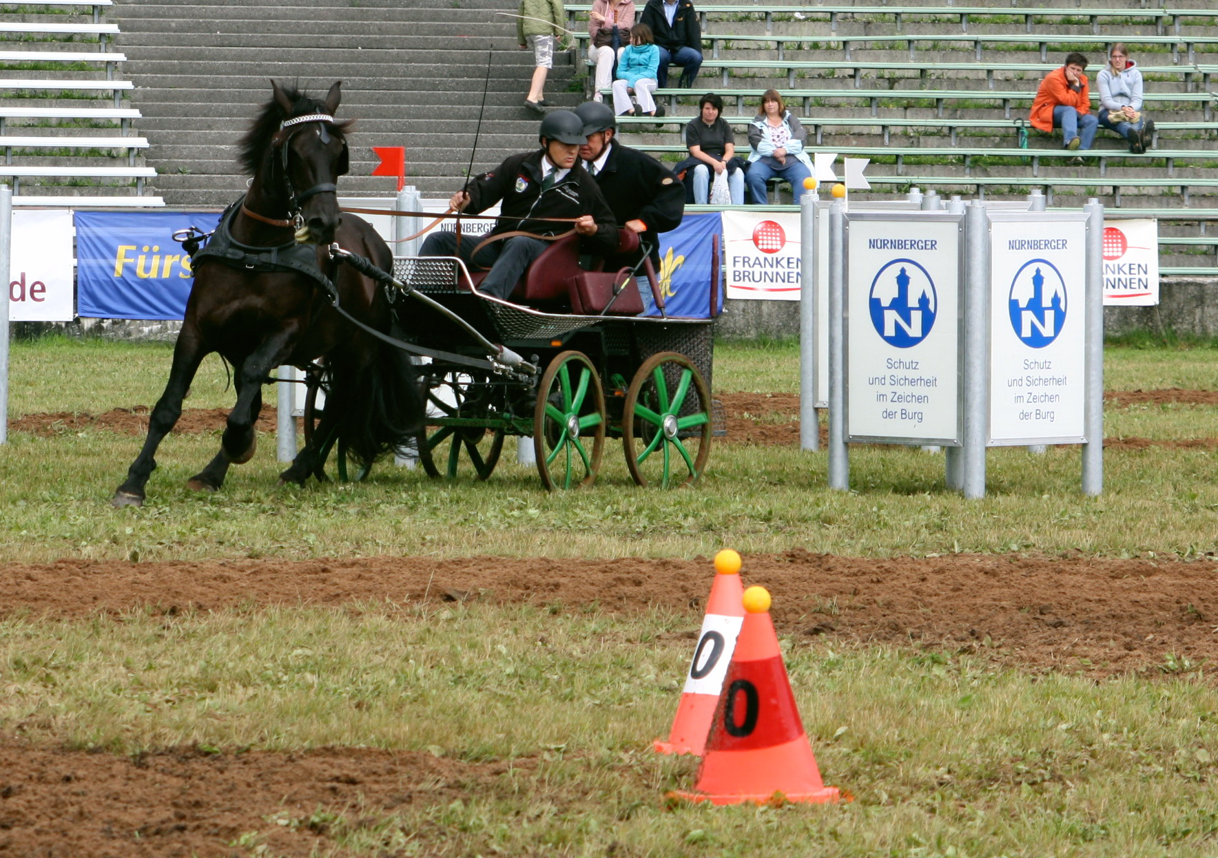 Gebrauchsprüfung für Fahrpferde auf der Pferd International 2011